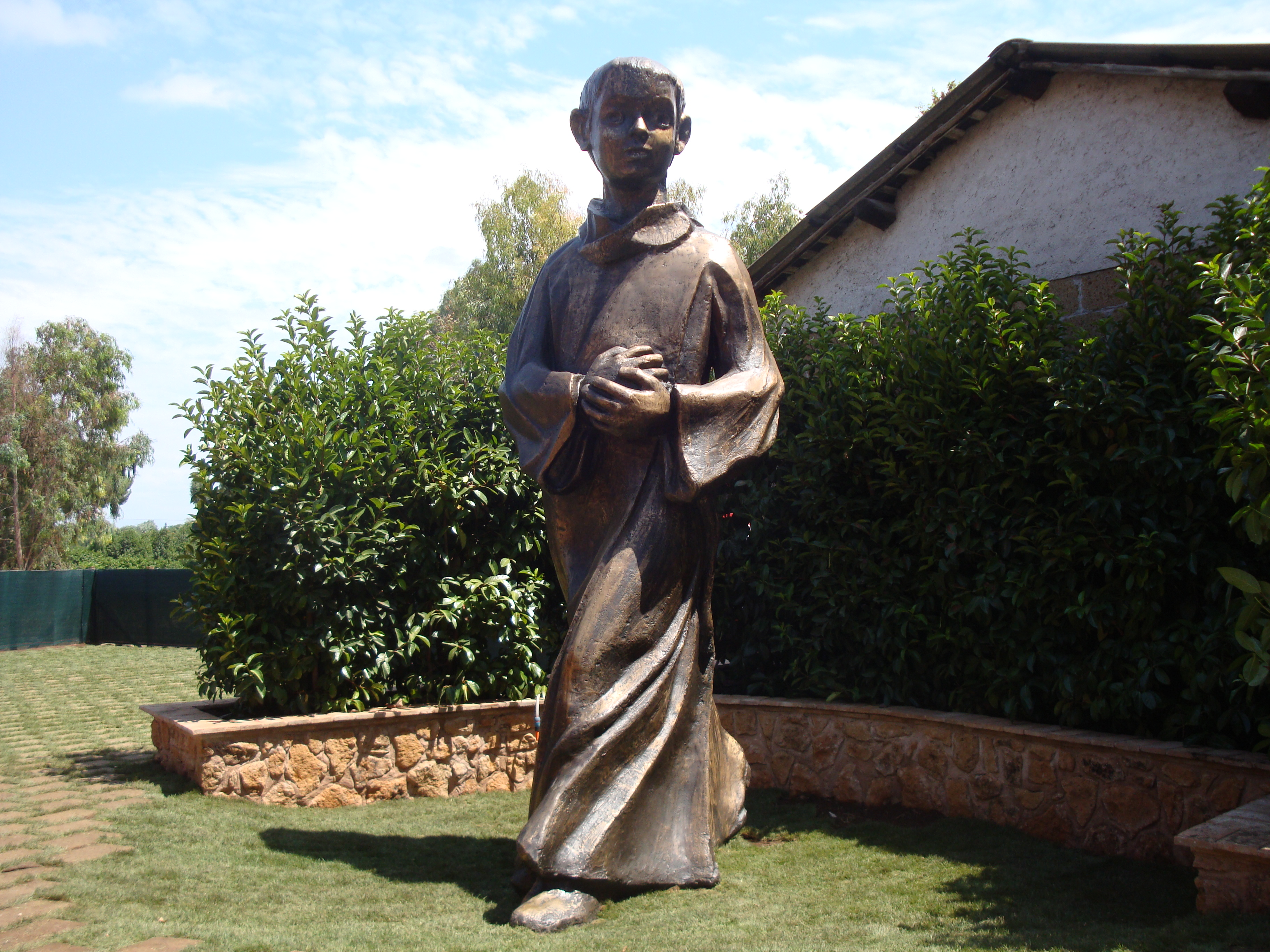 Tarcisiusstatue: endgültiger Platz in Rom